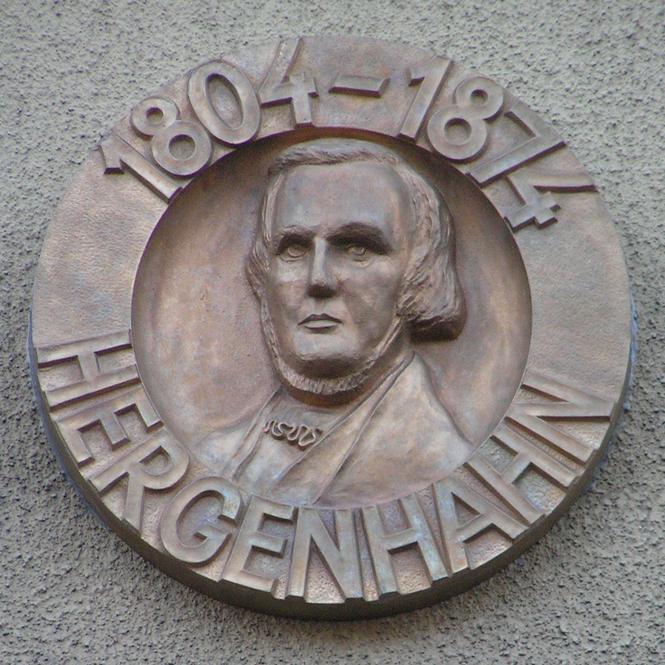 Gedenkplakette für August Hergenhahn in der Obergasse 25 in Usingen. Die Plakette wurde 2007 von Kurt Heinrich aus Merzhausen gestaltet.